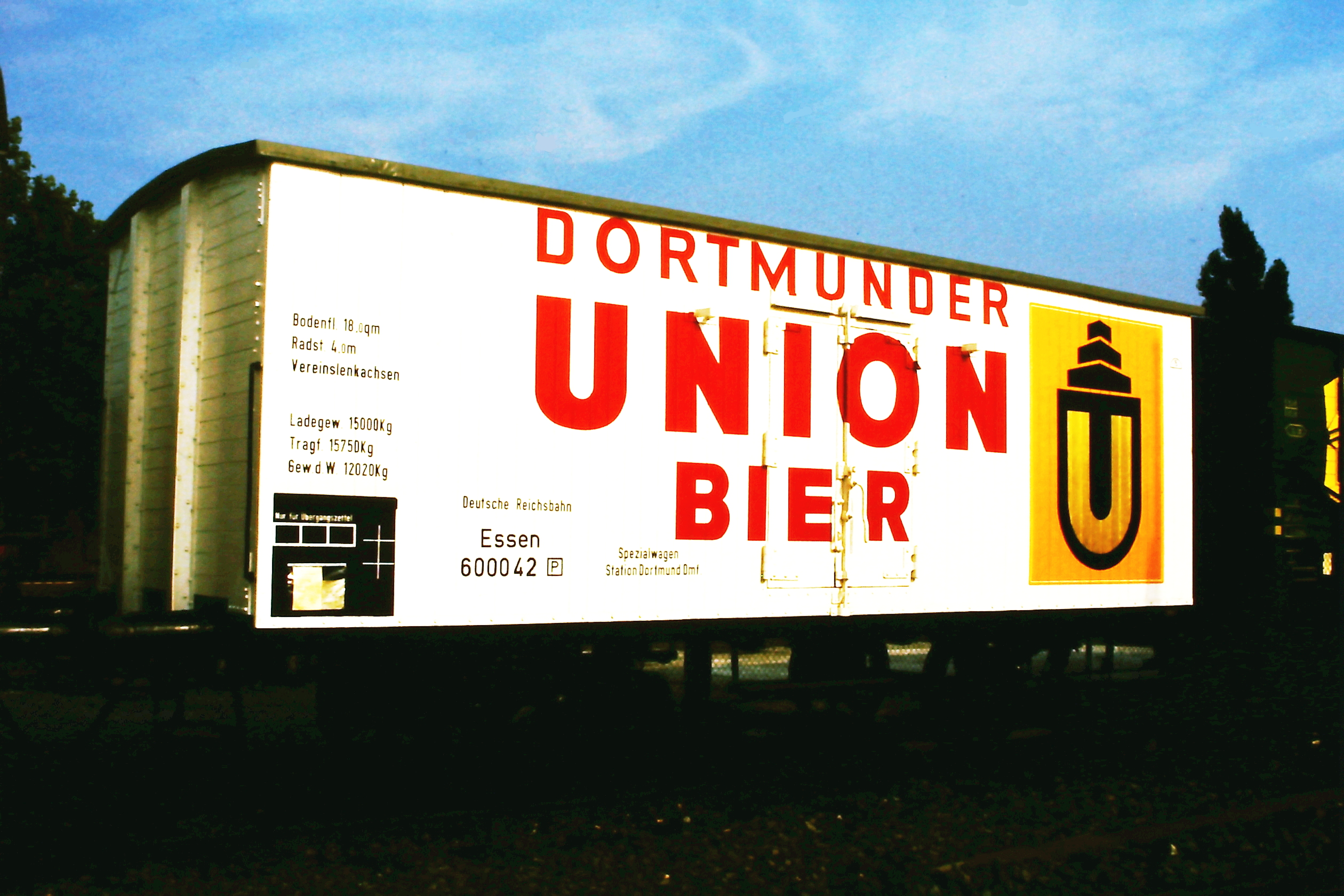 Bierwaggon der Dortmunder Union Brauerei, ausgestellt auf der Fahrzeugschau 150 Jahre deutsche Eisenbahn in Bochum-Dahlhausen